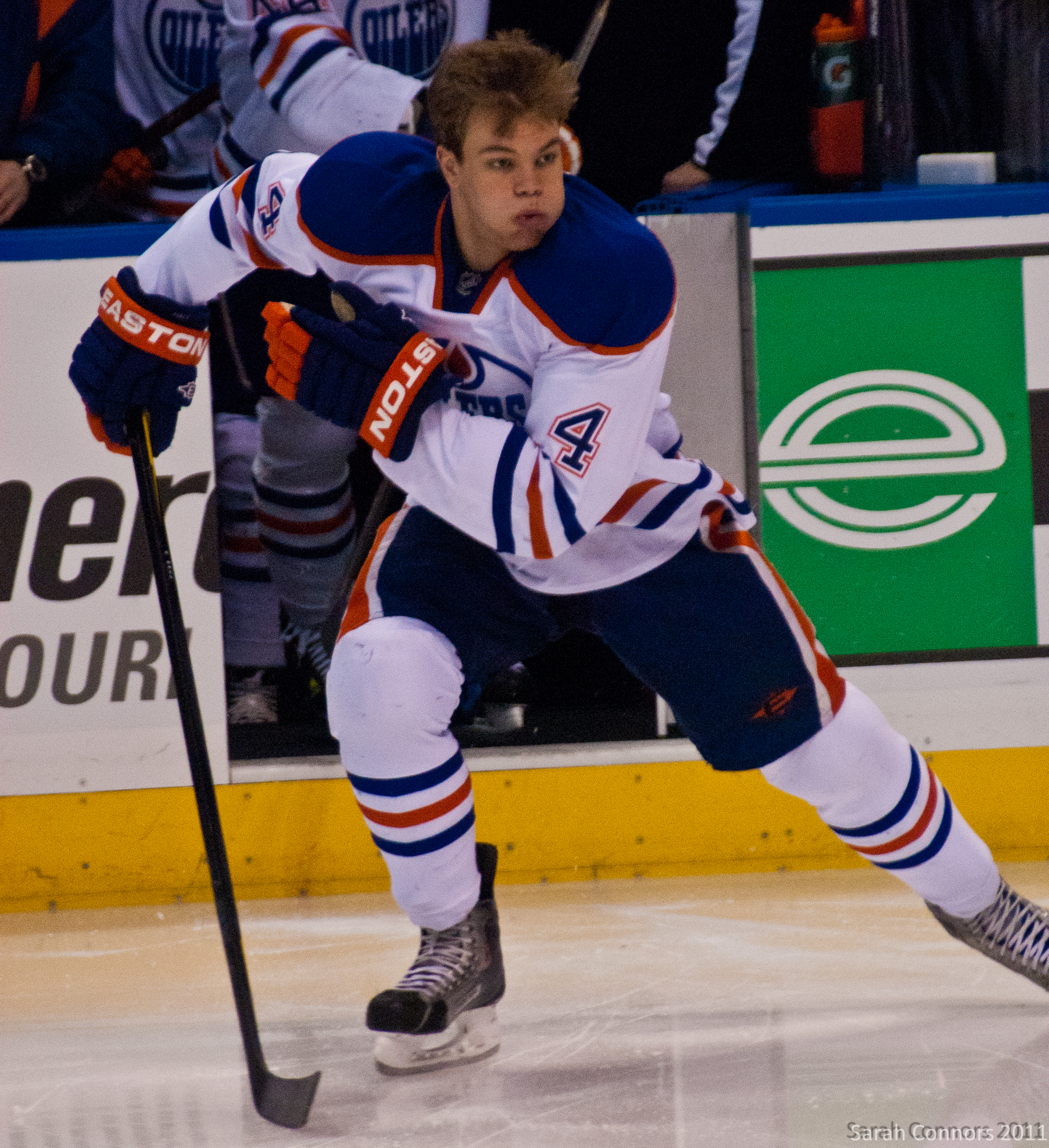 Blues vs. Oilers-9046.jpg